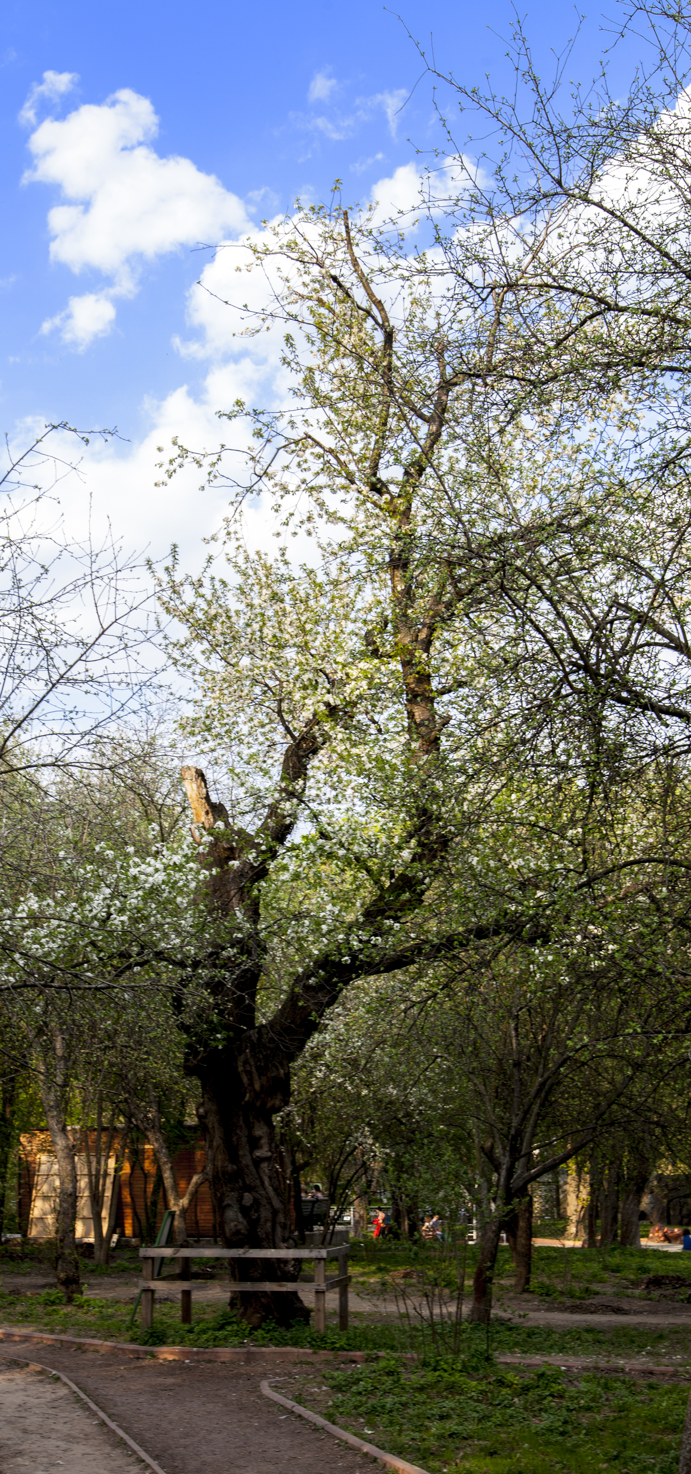 Більш, ніж 120 років. Обсяг 2,2—2,7 м. Висота 10 м. Найстаріші черешні Києва. У 2008 році проведене лікування.